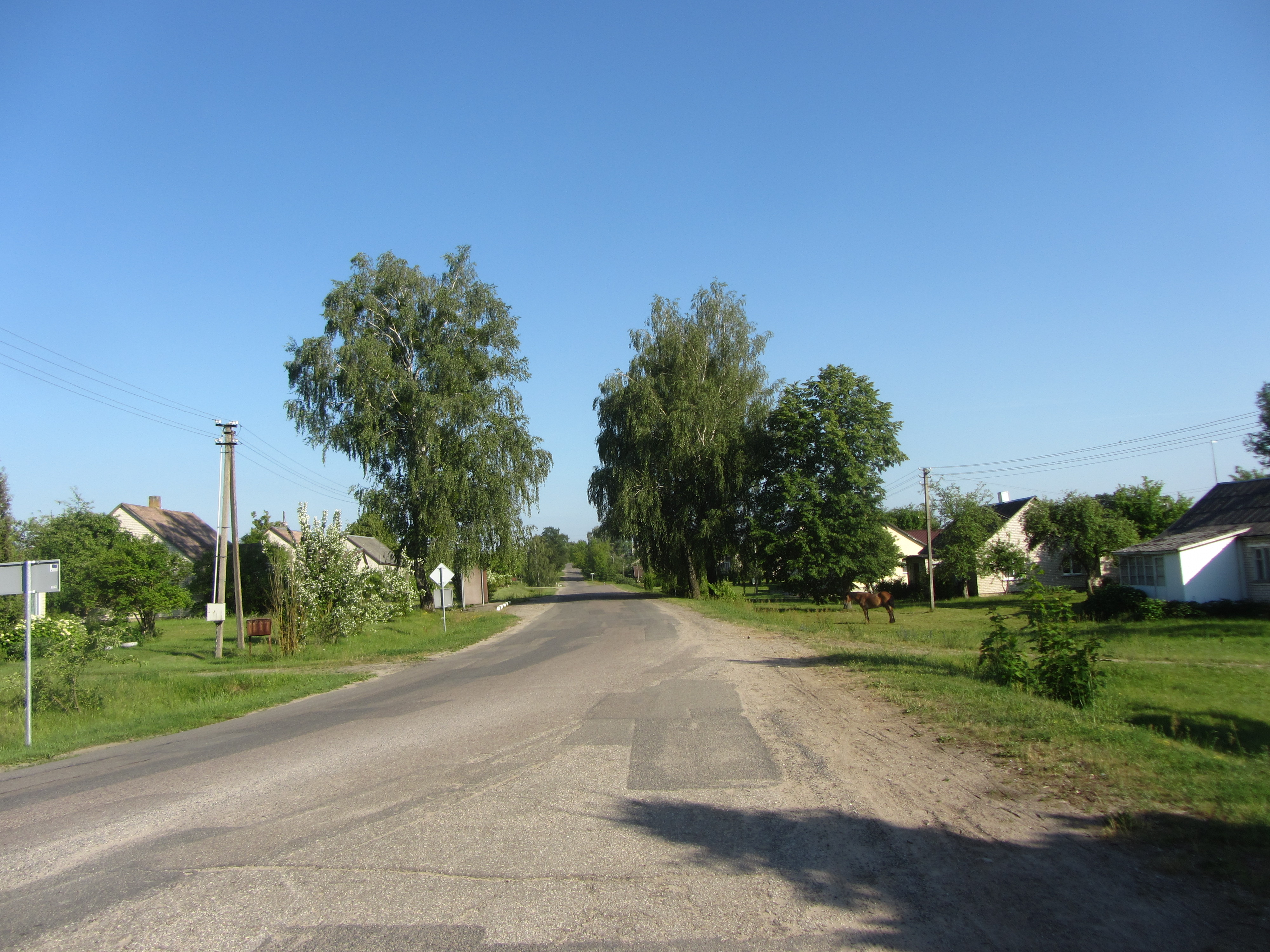 Ryliškiai, Lithuania